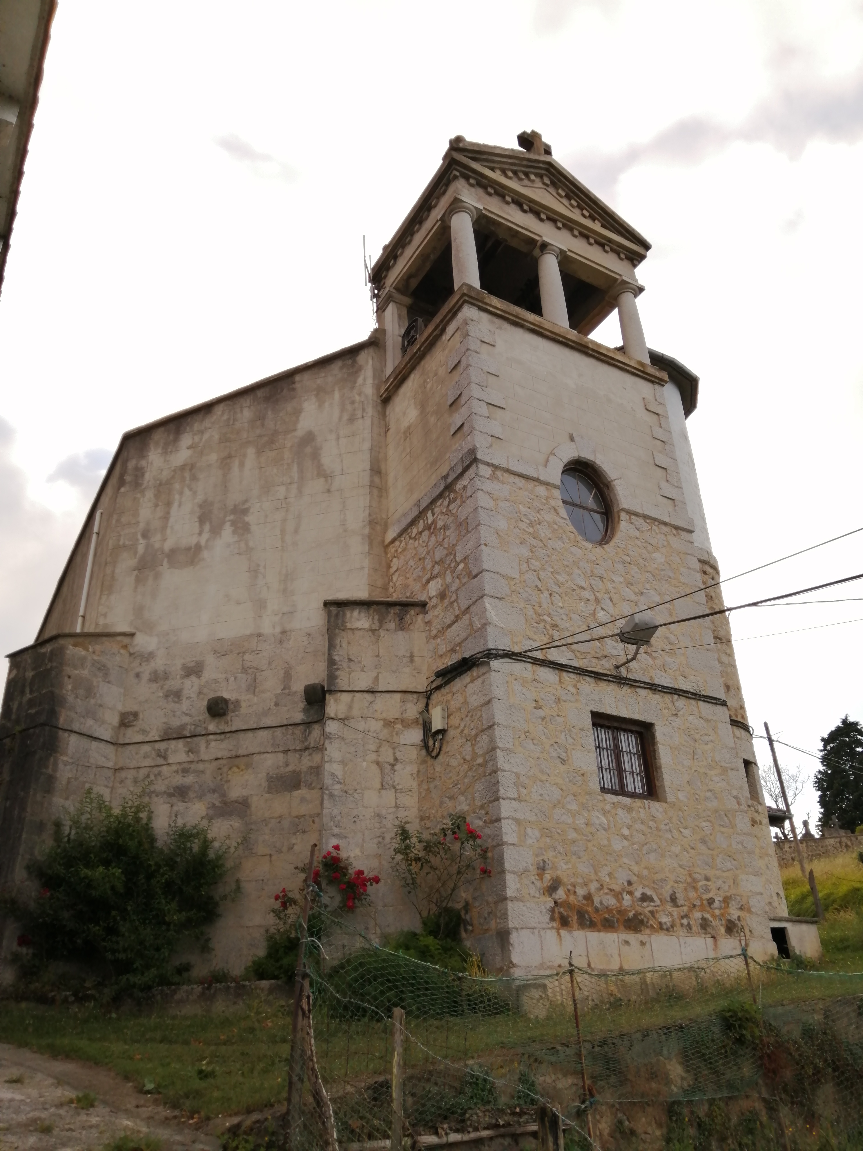 Ondarroako Antiguako Ama eliza